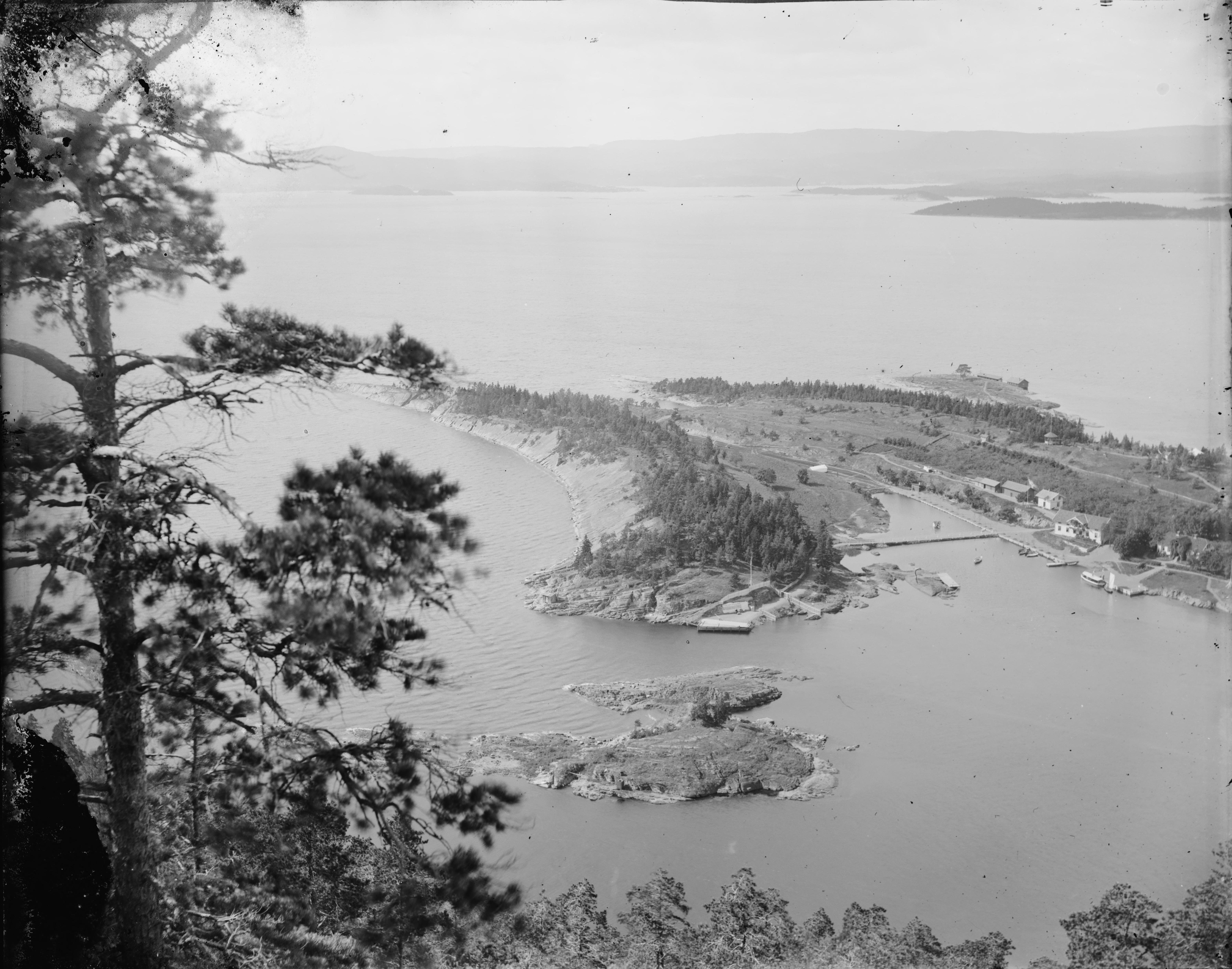 Påskrift konvolutt: Utsikt over sjøen M.Skøien [Riksantikvaren] Sted: Ildjernet Kommune: Nesodden Fylke: Akershus Tagger: landskap utsikt fjord